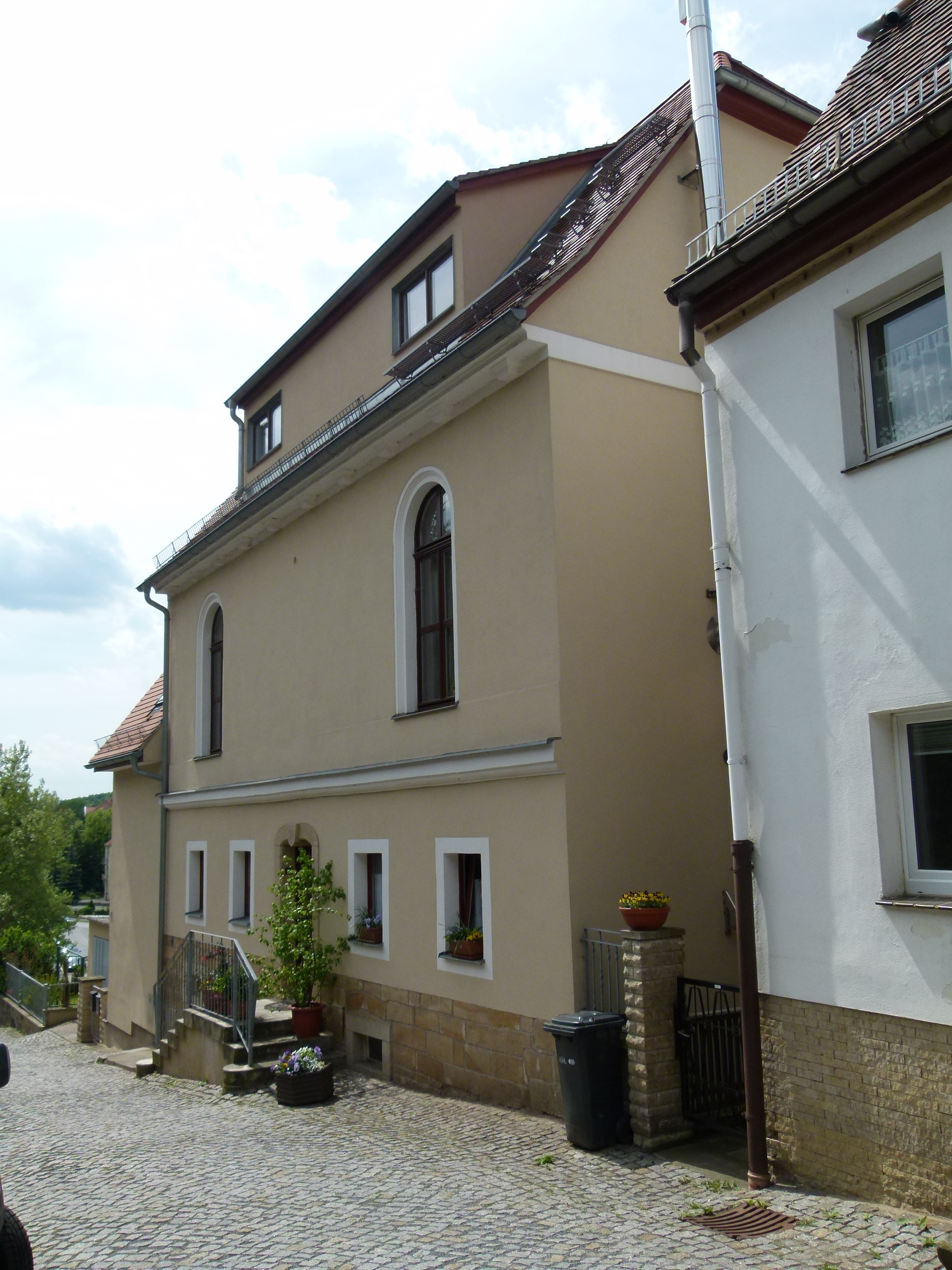 Denkmalgeschütztes Haus, Am Hausberg 1, Pirna, Sachsen